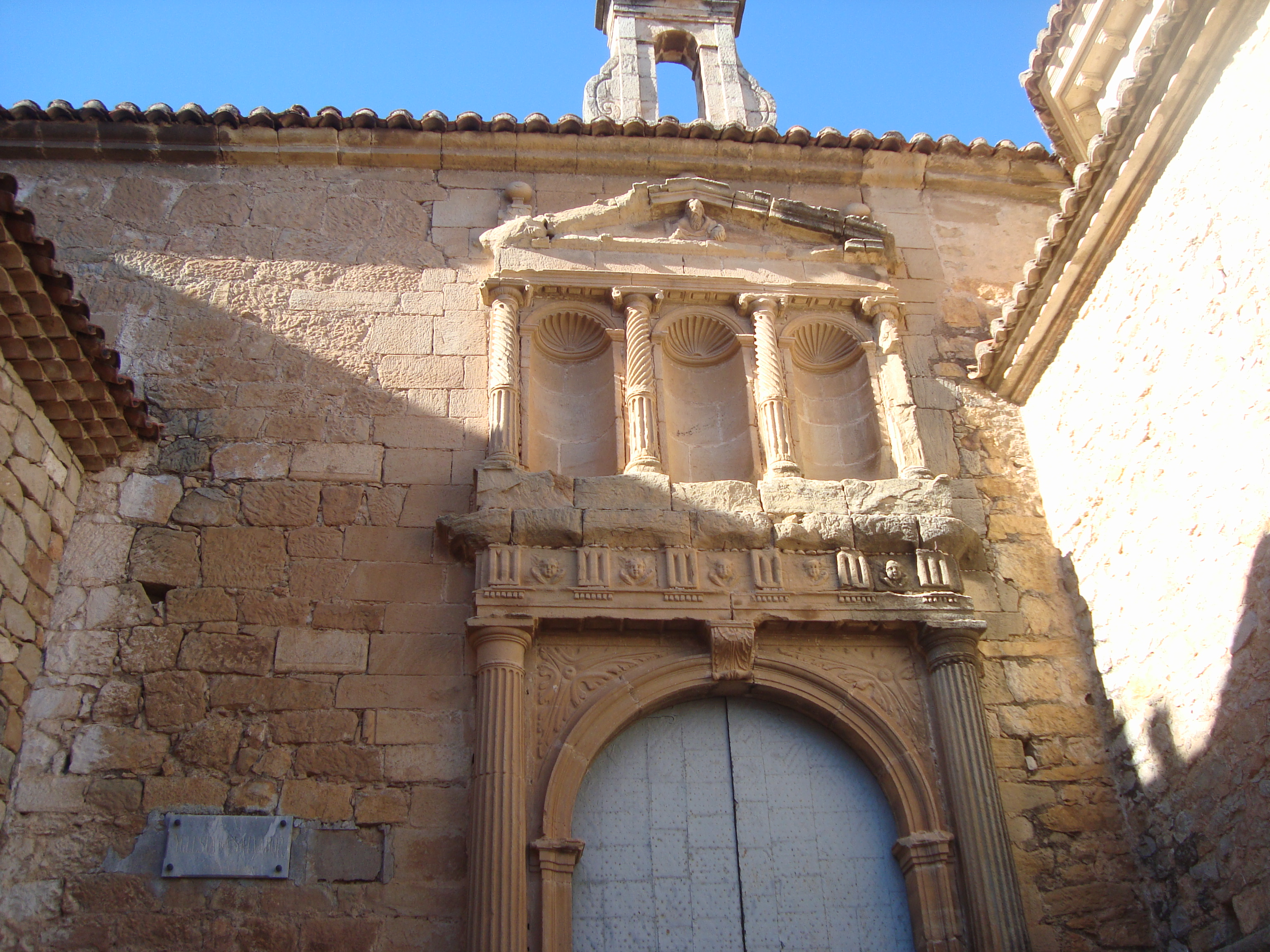 Església parroquial del Salvador (Sucaina) 08.142-001.